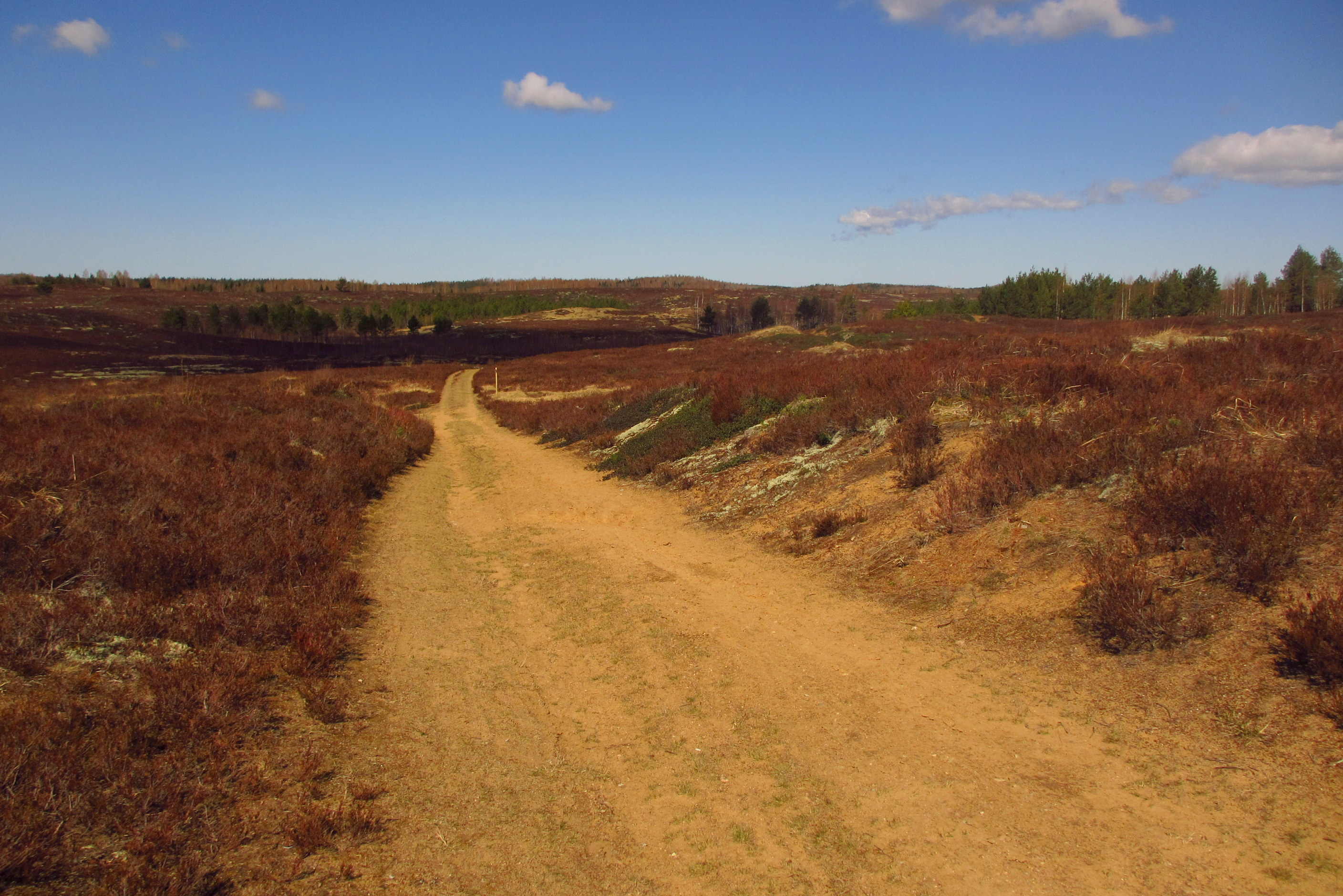 Jussi Nõmm Põhja-Kõrvemaa MKAl maikuus